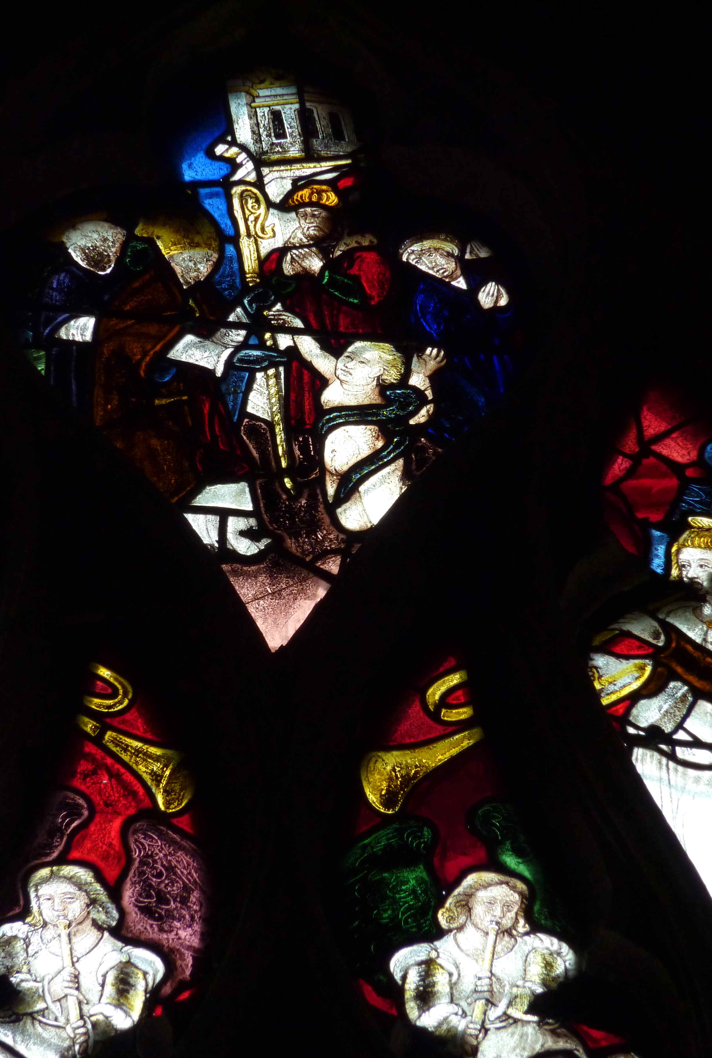 Katholische Pfarrkirche Notre-Dame-des-Marais in La Ferté-Bernard im Département Sarthe (Pays de la Loire/Frankreich), Bleiglasfenster (baie 3), mit Fragmenten aus der Zeit um 1533 von François Delalande im Maßwerk und im oberen Teil der Lanzetten, Lanzetten von 1873, von Édouard Rathouis, aus der Glasmalereiwerkstatt der Karmeliten von Le Mans (Carmel du Mans), mit Signatur: E. RATHOUIS; Darstellung: Marientod; Maßwerk mit Fragmenten aus der Zeit um 1533 von François Delalande (Ausschnitt)